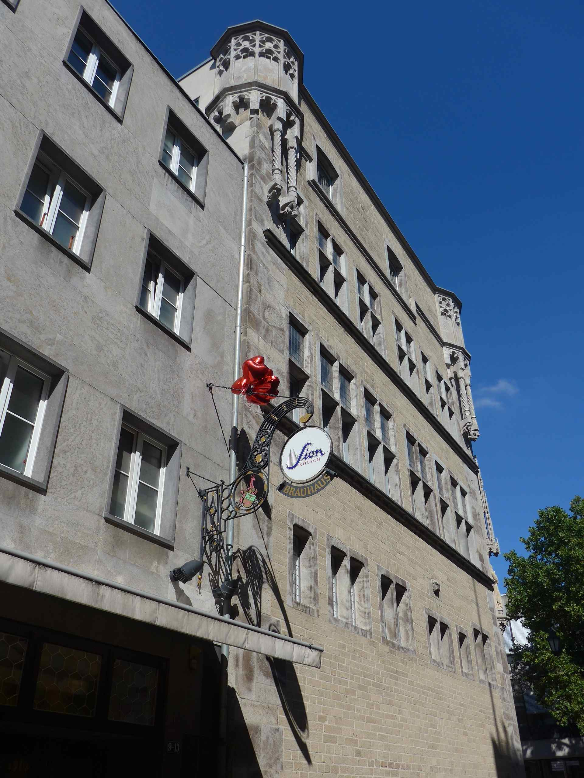 Haus Saaleck, Am Hof 50, Ansicht Unter Taschenmacher This is a photograph of an architectural monument.